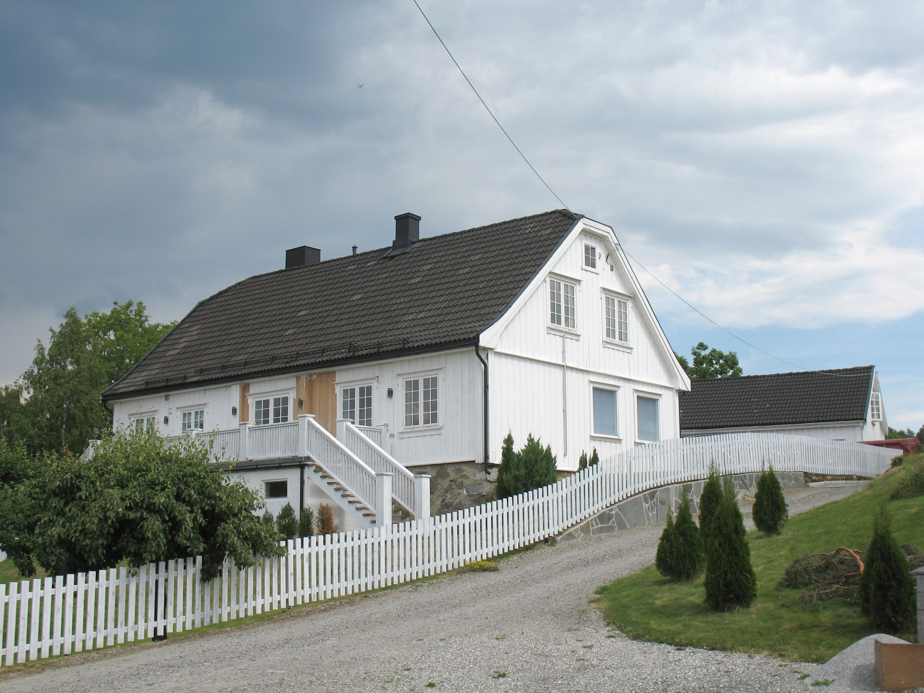 Ulsrud Gård i Oslo